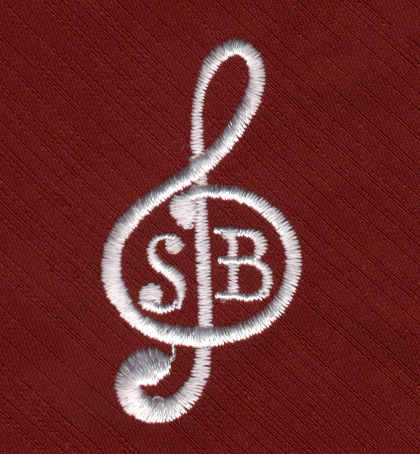 Logo til Pensjonistkoret Sangbrødrene